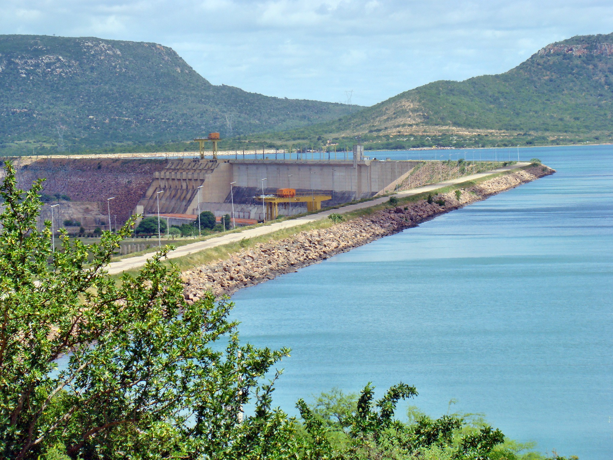 Uma das Hidrelétricas no Rio São Francisco